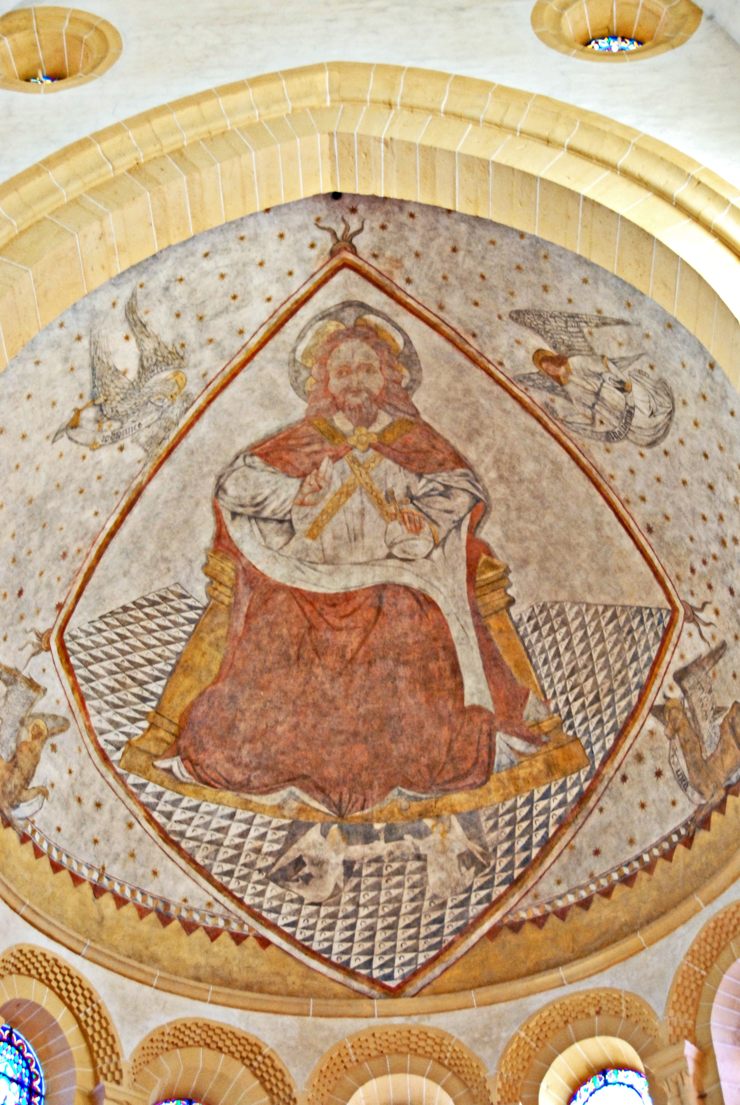 Fresko in Chorapsis